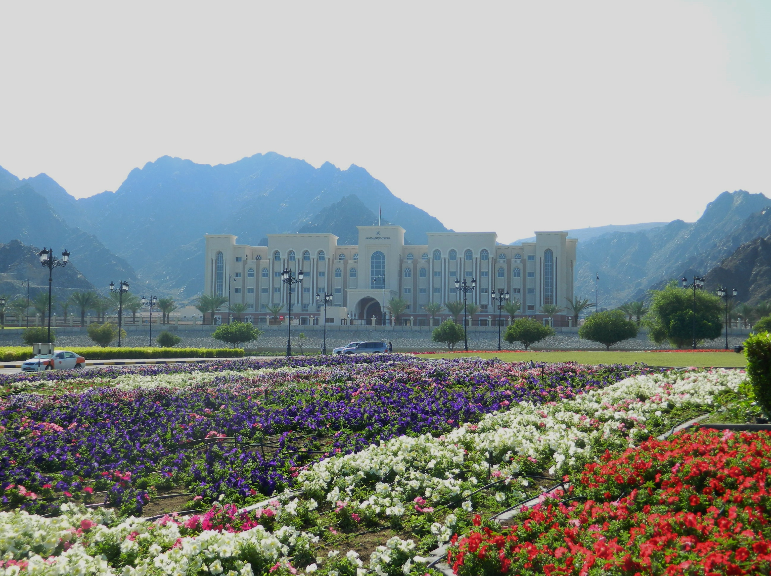 Omanin valtionhallintorakennus Muscatissa